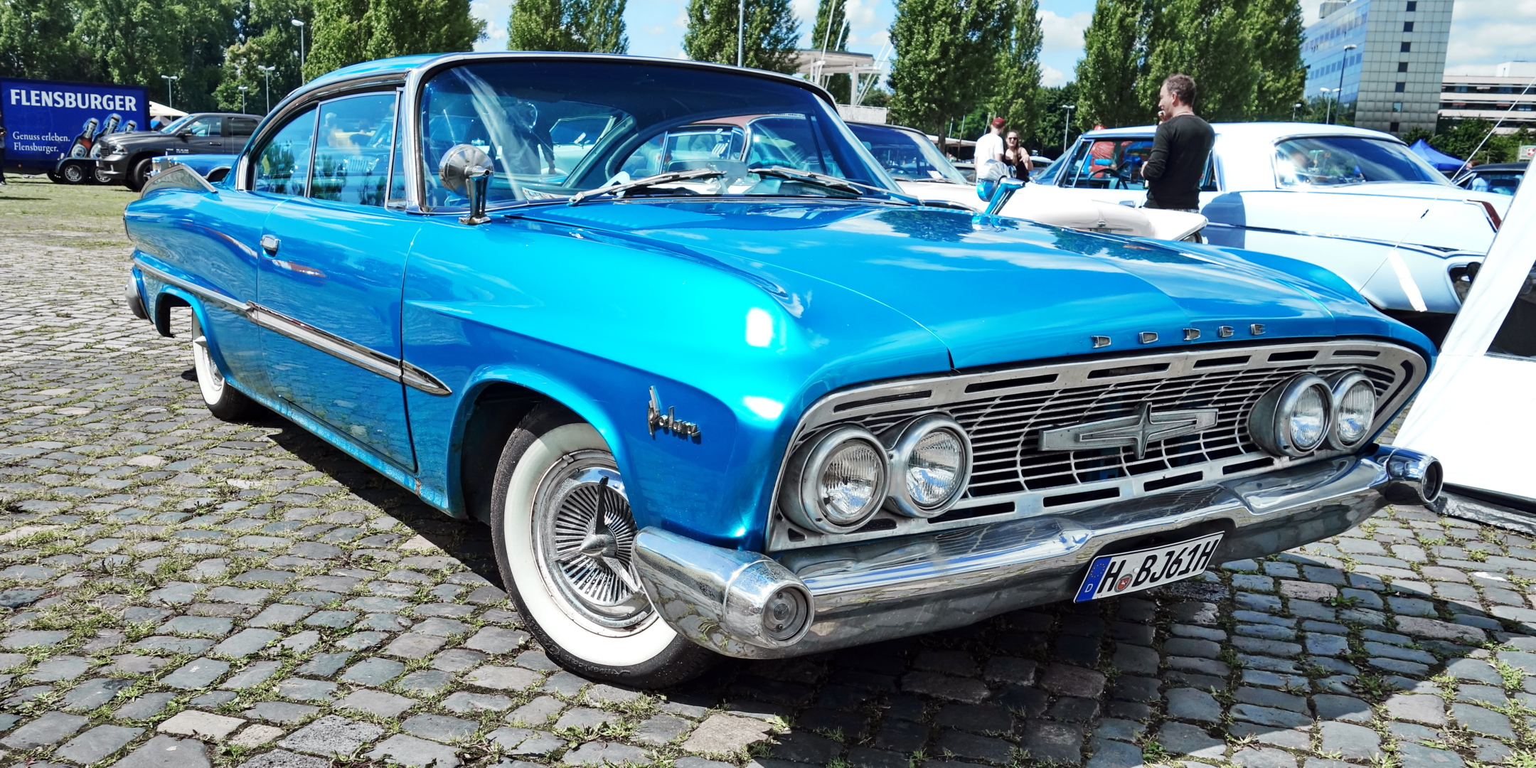 1961 Dodge Polara